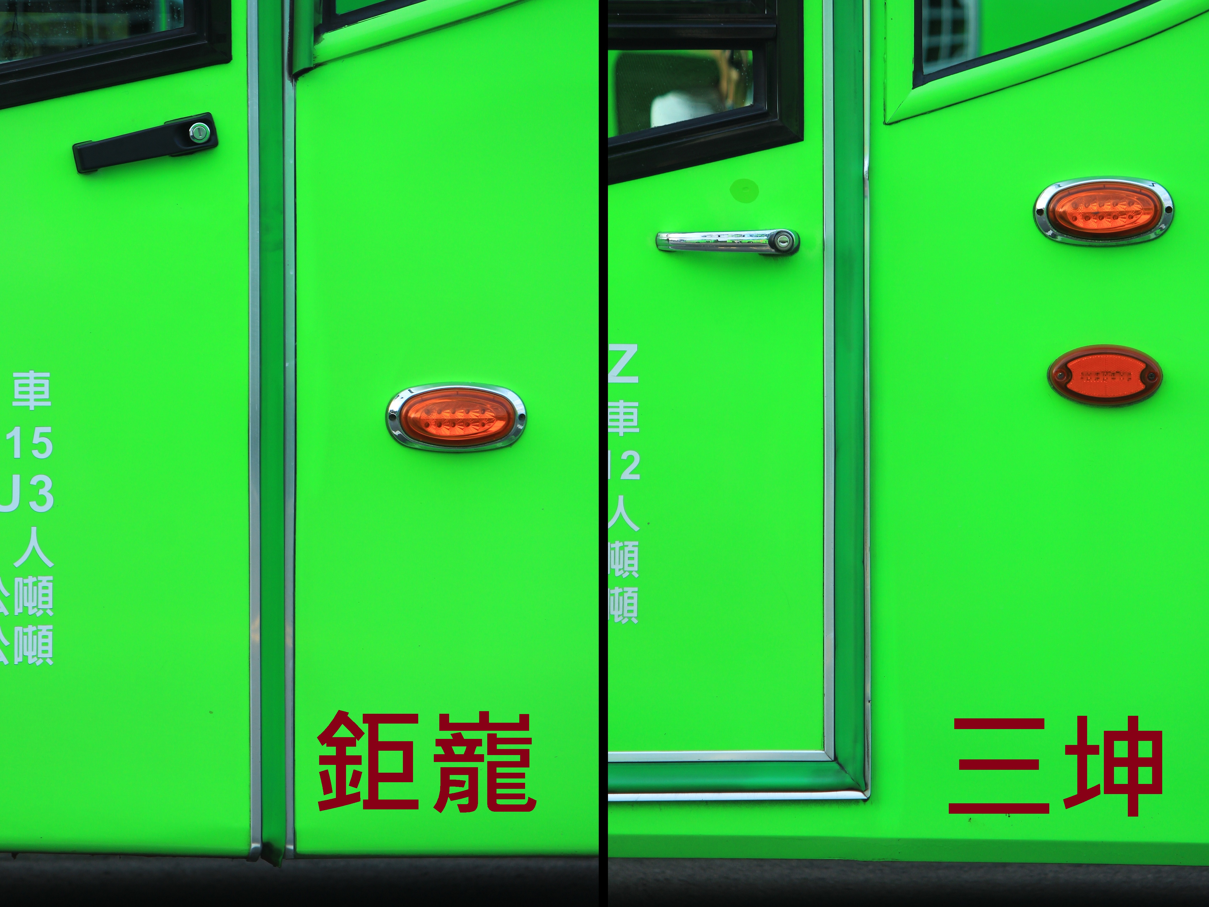 統聯客運SCANIA K400IB4X2NB大客車駕駛側區分方式。左為鉅巃車體，右為三坤車體，駕駛門把手樣式與車側方向燈數量各有不同之處。